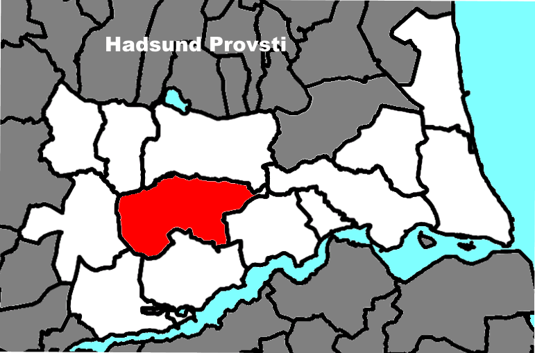 Sognets beliggenhed i Hadsund Provsti.